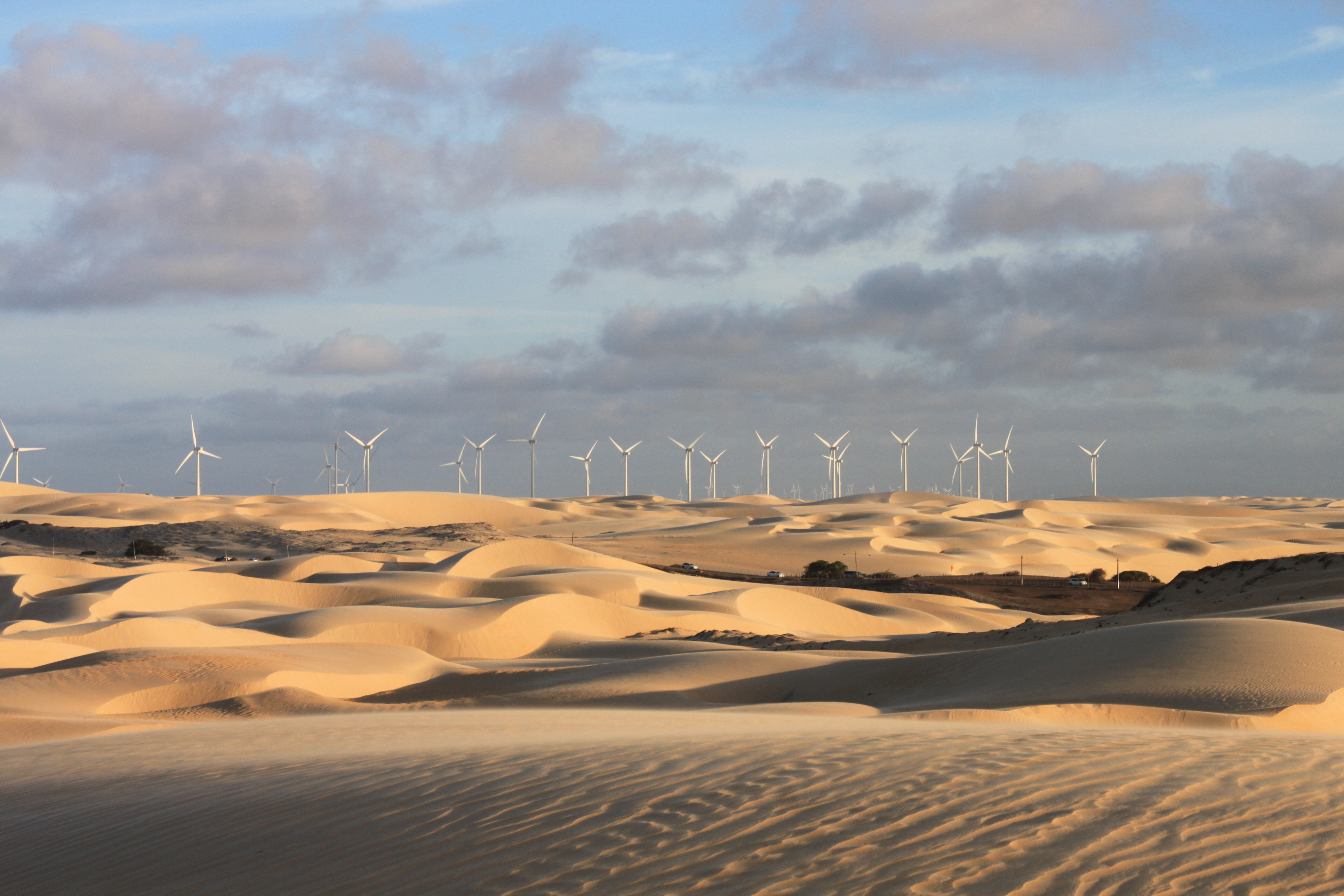 Visão do parque eólico localizado em Paracuru. Existem vários desses espalhados pelo Ceará. A presença de usinas eólicas é muito grande no Nordeste, principalmente no Ceará.